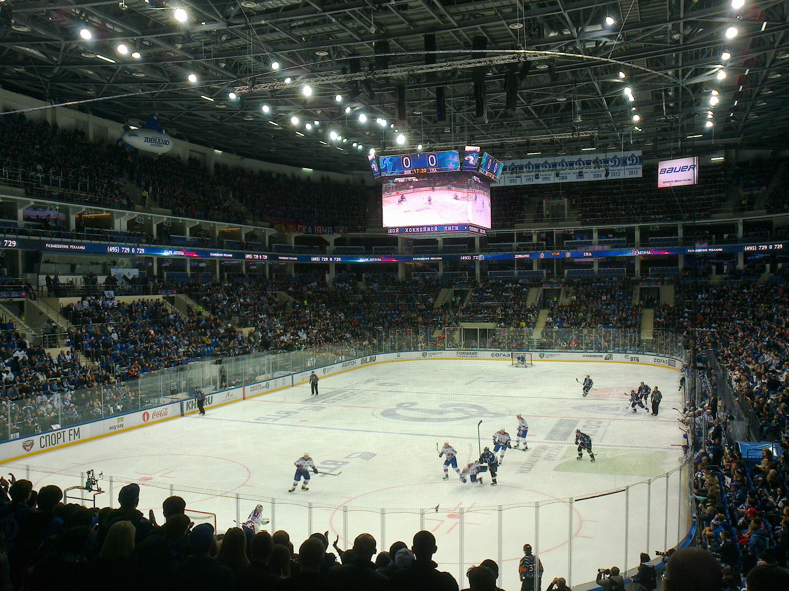 Начало третьей игры матча Динамо Москва - СКА